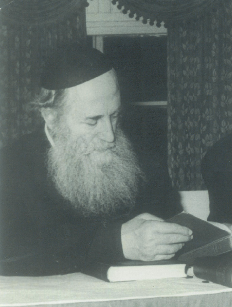 הרב צבי שרגא גרוסברד מבחן ארצי לנוער של חתן המשנה